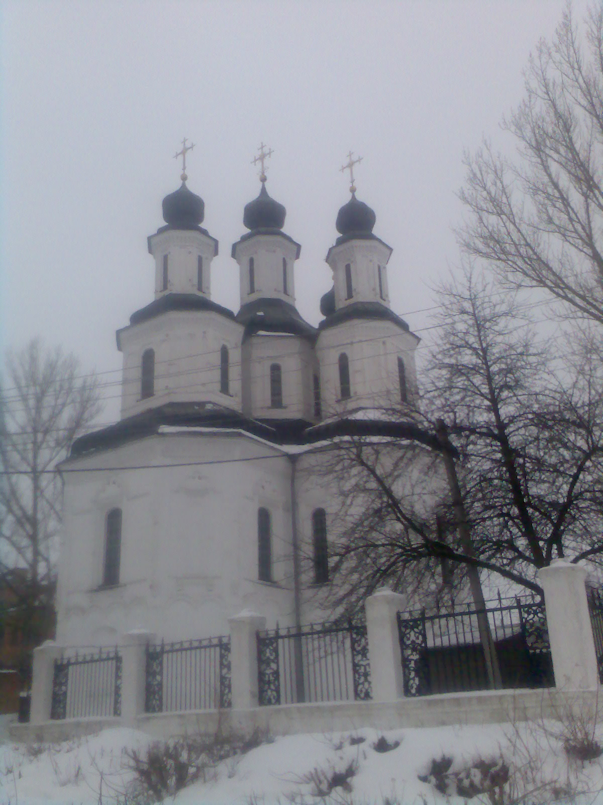 Свято-Преображенський собор (м. Ізюм)